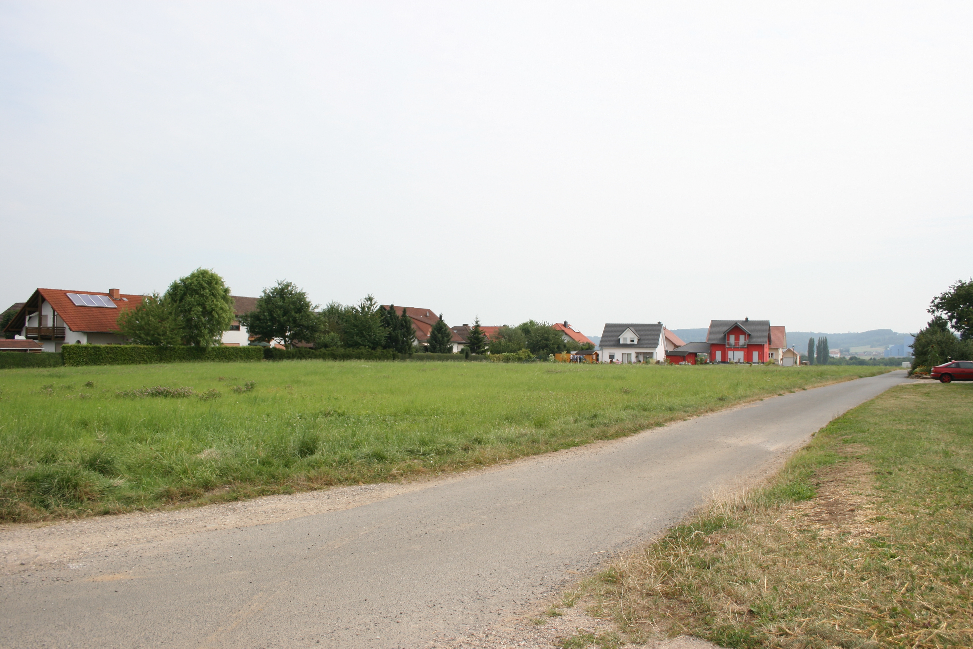 Kleinkastell Staden, Gemeinde Florstadt in Hessen. Ansicht des Kastellgeländes südlich des Neubaugebiets.